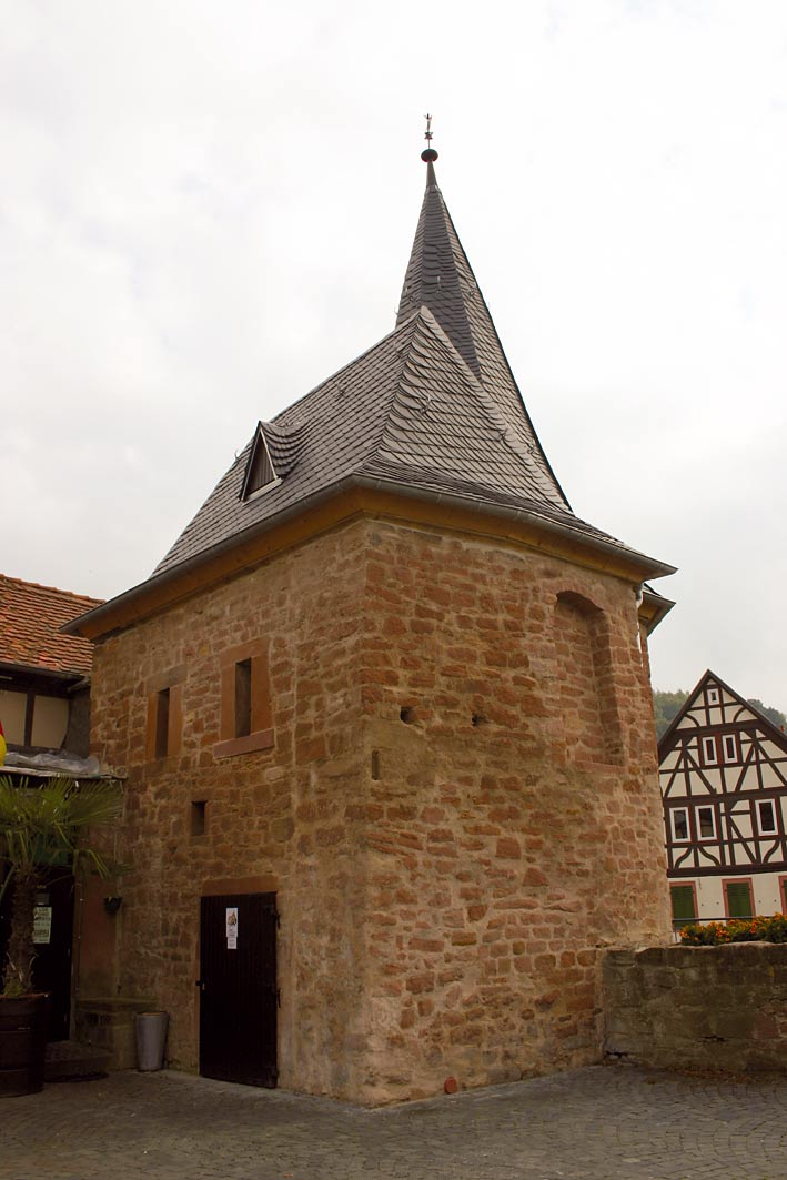 Das Schlaghaus - Nordseite in Büdingen, Südfront, selbst fotografiert am 30. September 2006